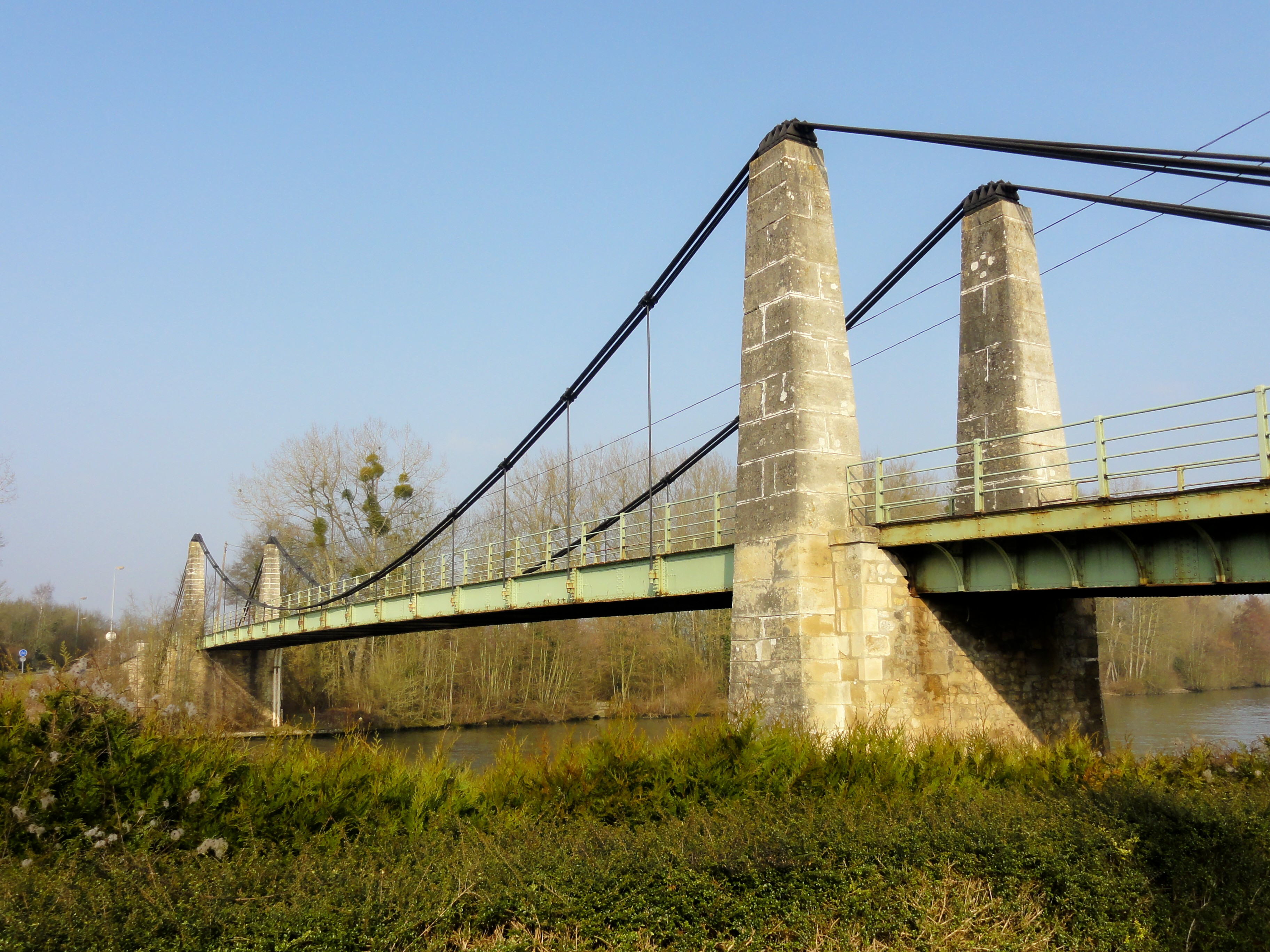 Le pont de l'Oise sur la RD 98 au hameau du Bac, entre Le Meux et Lacroix-Saint-Ouen.